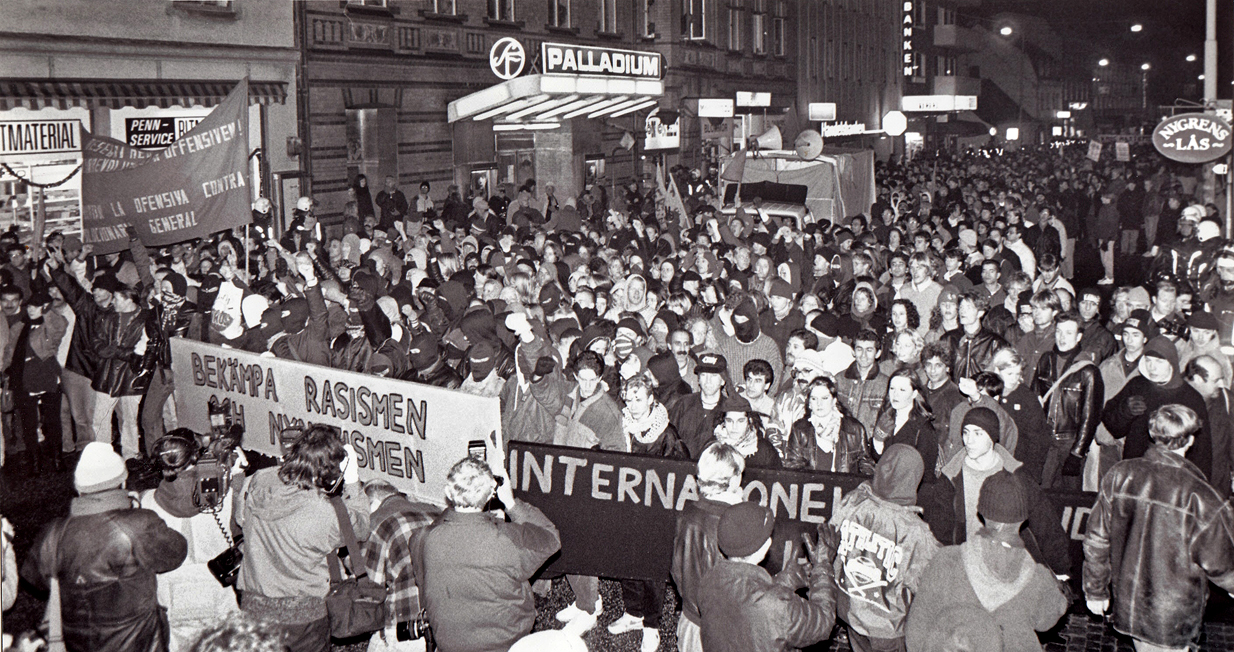 Stora Södergatan i Lund 30 nov 1991. Här ligger ett minnesmärke i form av en gatsten med inskriptionen."Här stoppades rasismen 1991-30-11"